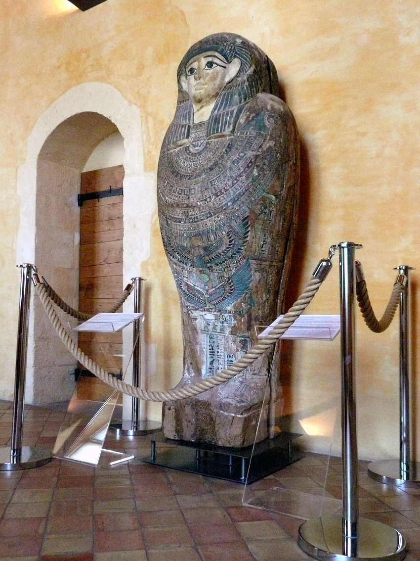 Sarcophage de dame Kaa-Iset, Moyenne Egypte, vers 330 avant J.C. Musée d'art sacré du gard, Pont-Saint-Esprit (Gard), France